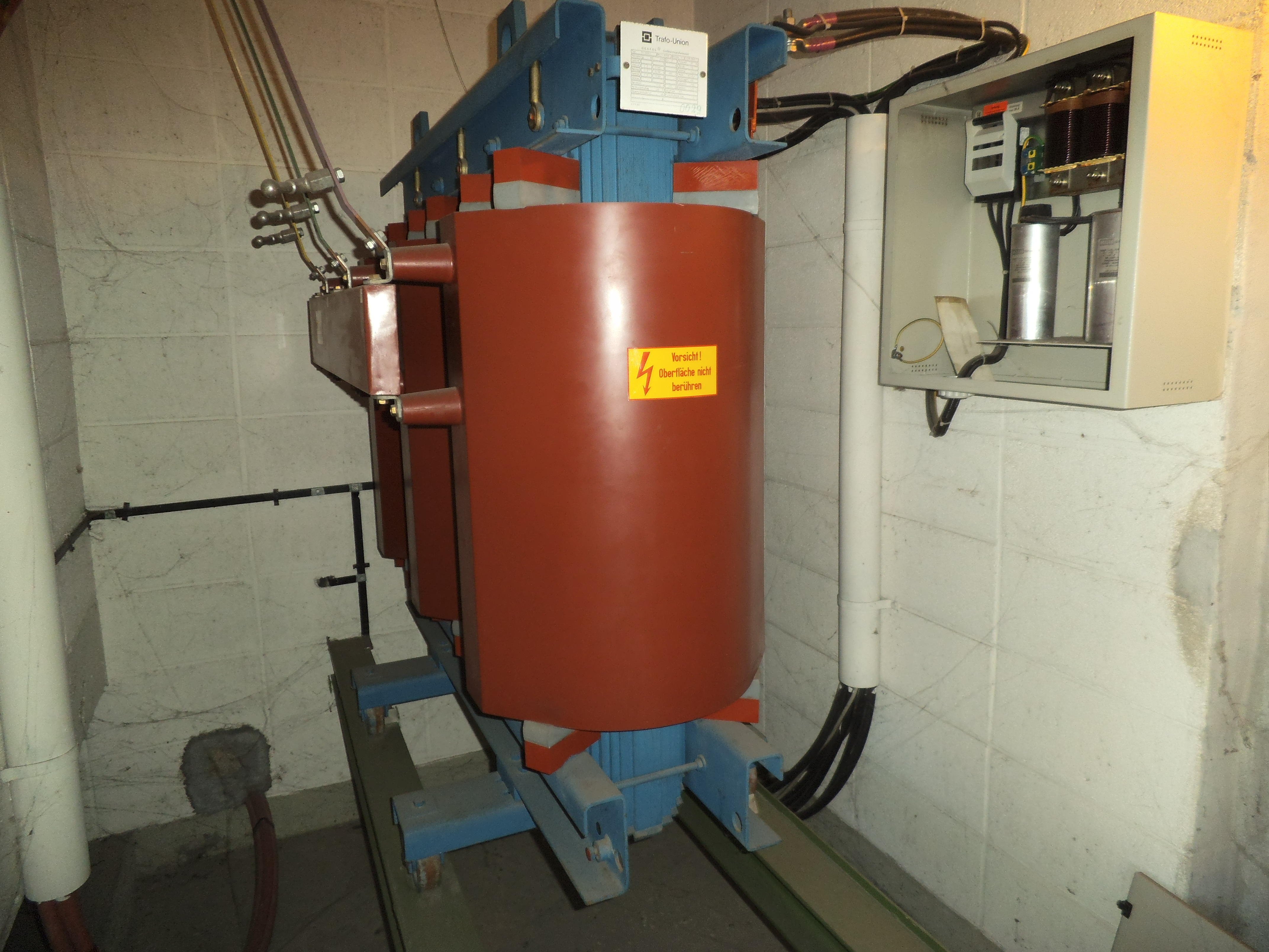 Gießharztransformator 20 kV/400 V 400 kVA